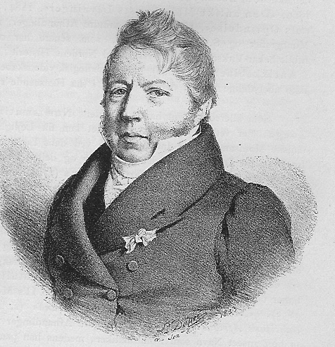 P.O. Brøndsted